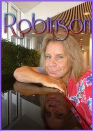 Robin Wikman flyygelin ääressä 2013.